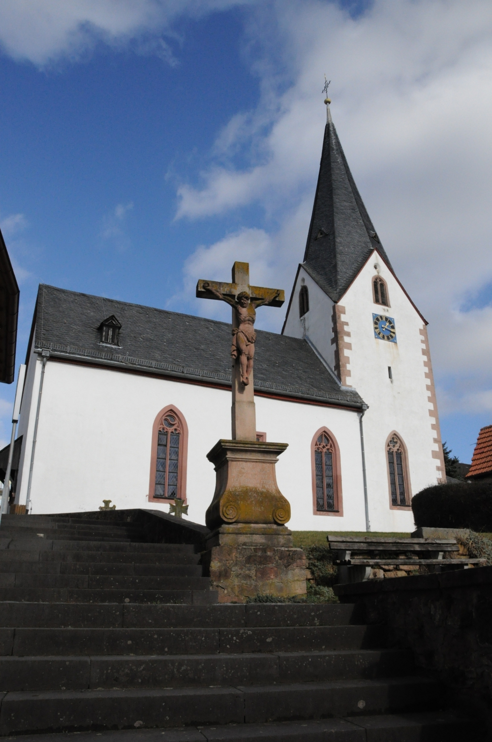 Radheimer Barokkirche von 1577